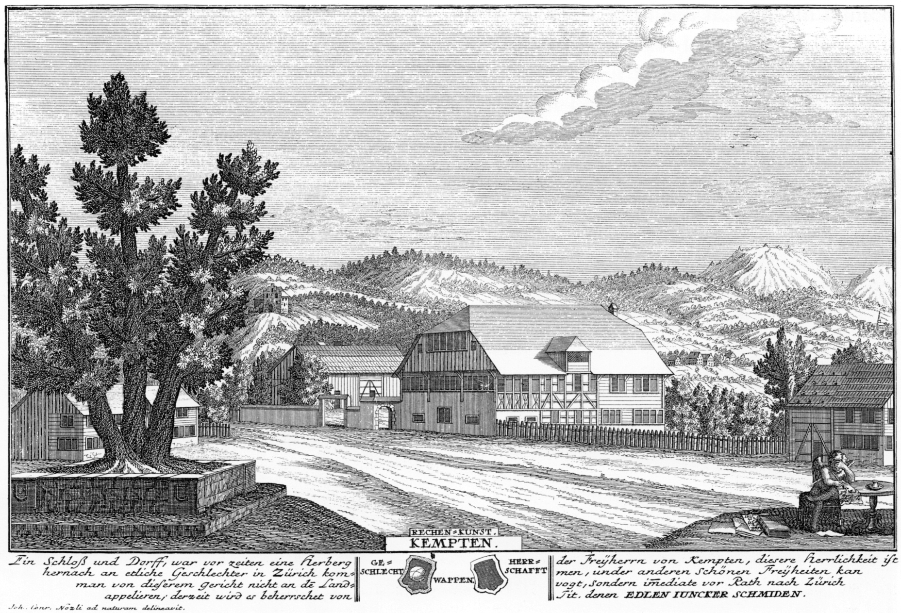 Burg und Unterhaus Kempten in der Gemeinde Wetzikon 1742. Radierung von David Herrliberger nach einer Tuschezeichnung von Hans Conrad Nözli. Erschienen in Herrlibergers Eigentliche Vorstellung der Adelichen Schlösser im Zürich Gebieth, Nr. 10, zweite Lieferung 1743.